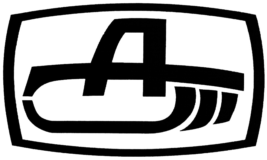 Logo des russischen Traktorenherstellers ATZ